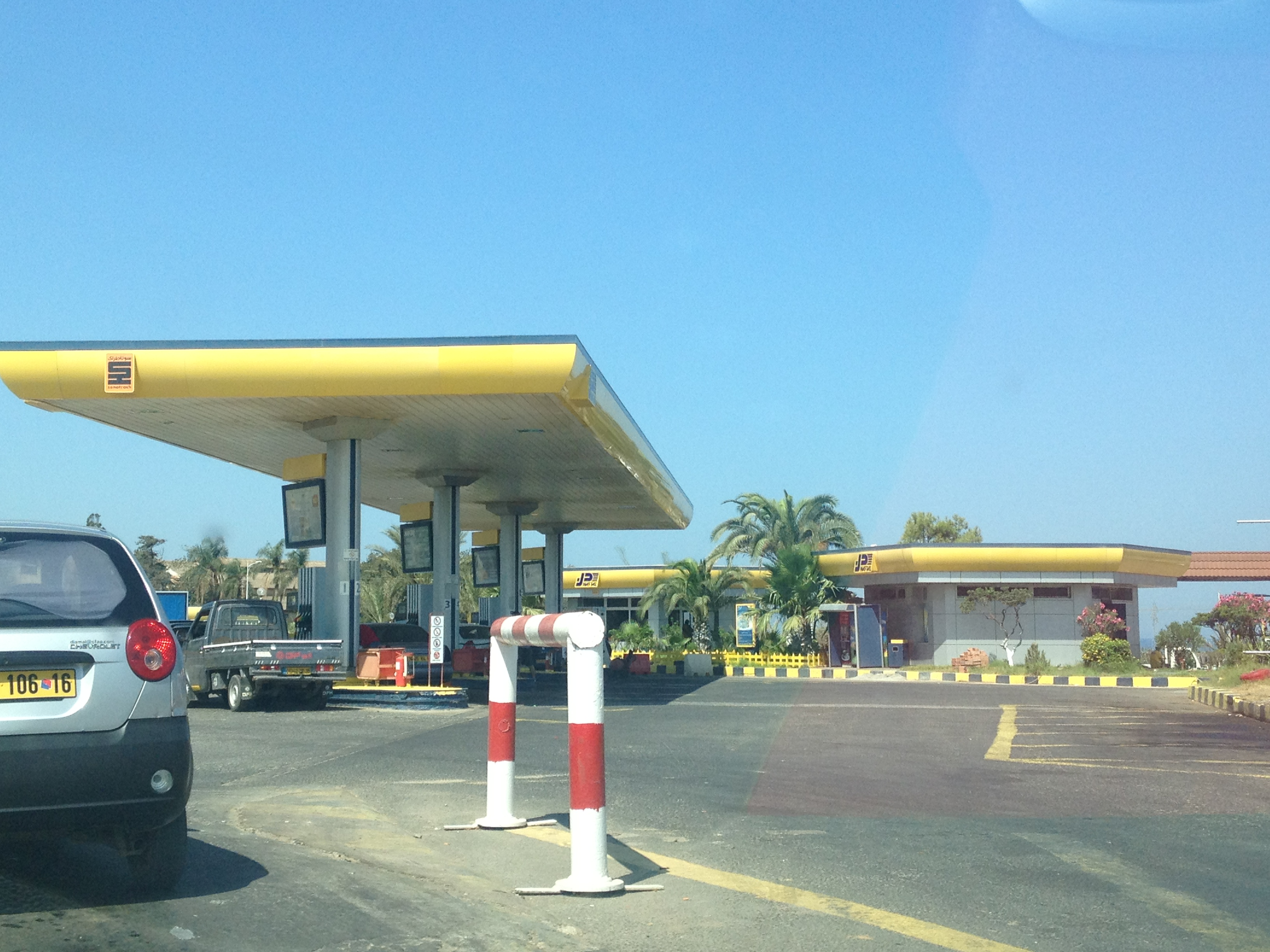 Station service Naftal sur l'autouroute à Zeralda 2